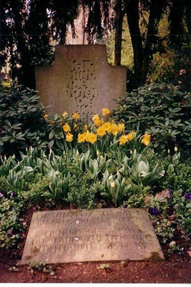 Vinzenz Schwind (* 12. Mai 1910 in Aschaffenburg; † 17. März 1974 ebenda) war Chemiker und von 1946 bis 1970 Oberbürgermeister der unterfränkischen Stadt Aschaffenburg im Freistaat Bayern.